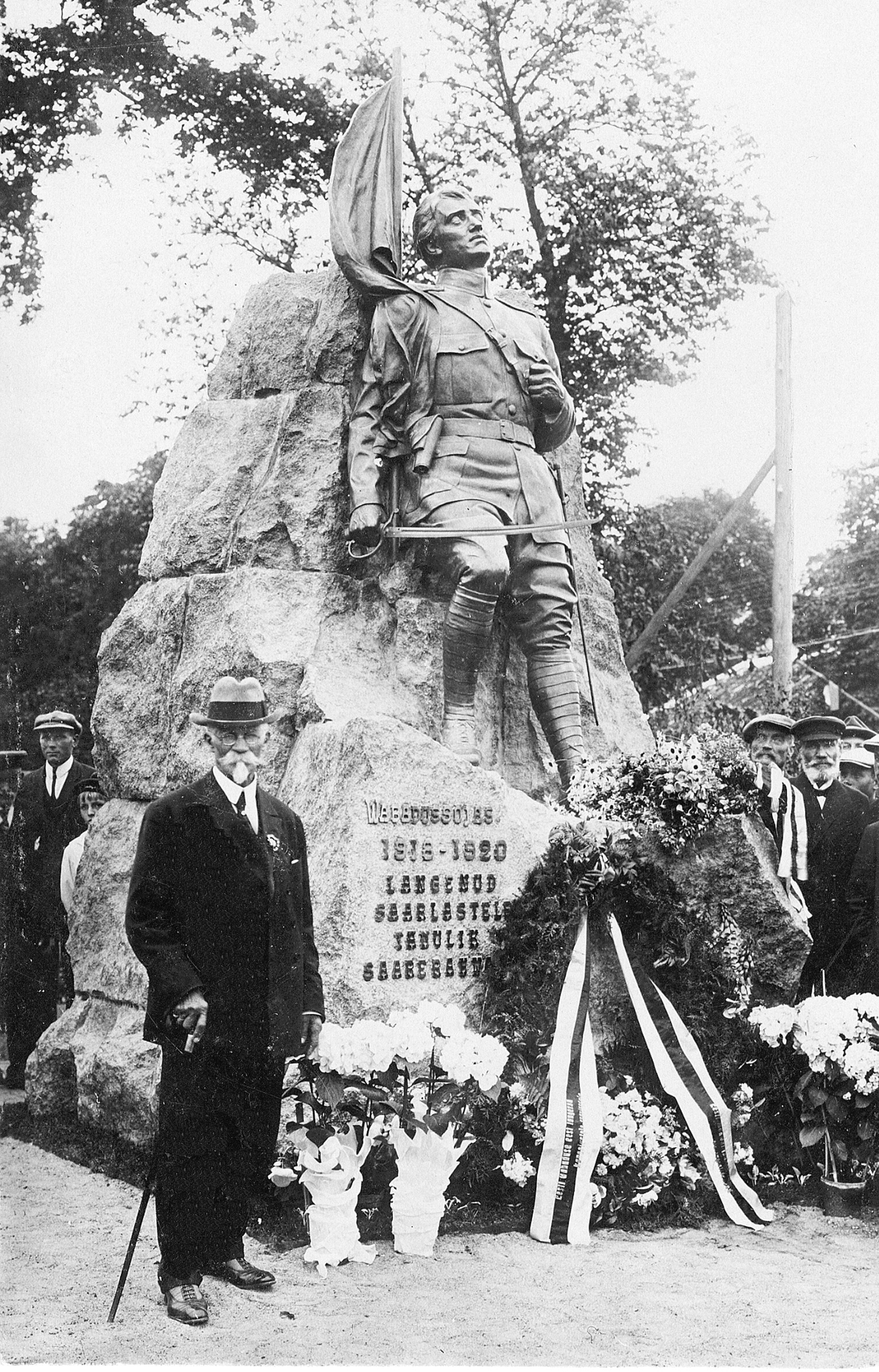 Vabadussõja mälestussamba juures Amandus Adamson. Kuressaare.